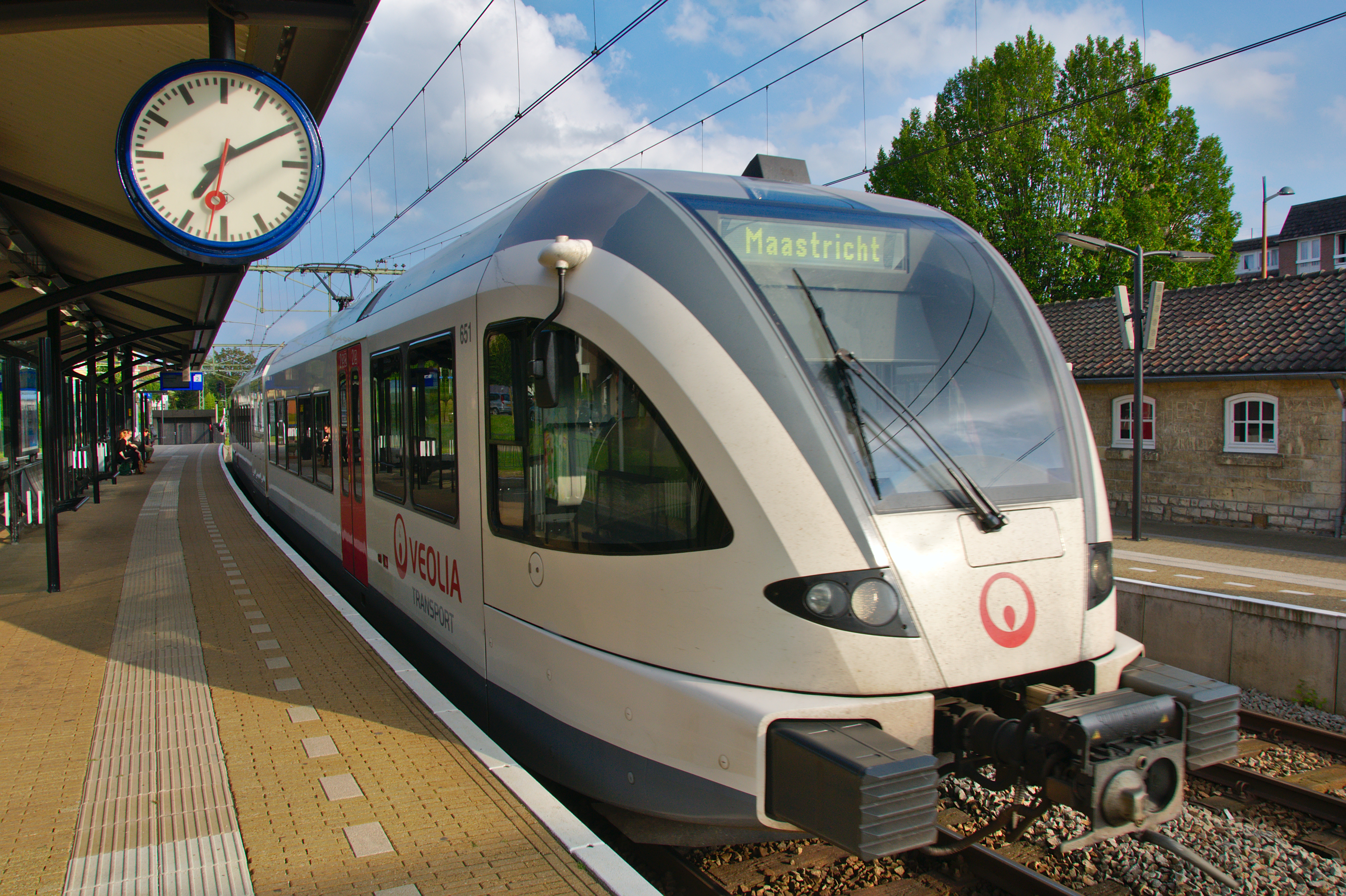 Station, Valkenburg aan de Geul, Limburg